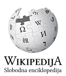 Wikipedia logo 2.0 (hr)